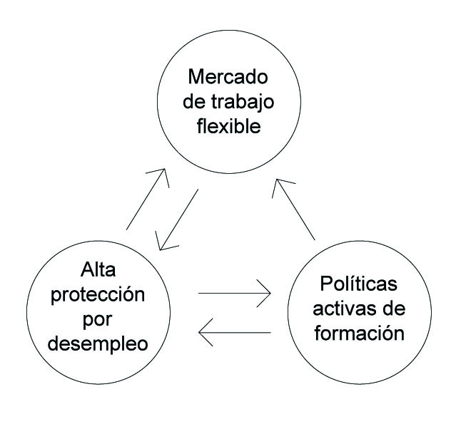 Diagrama del triángulo de oro relativo al concepto de flexiseguridad